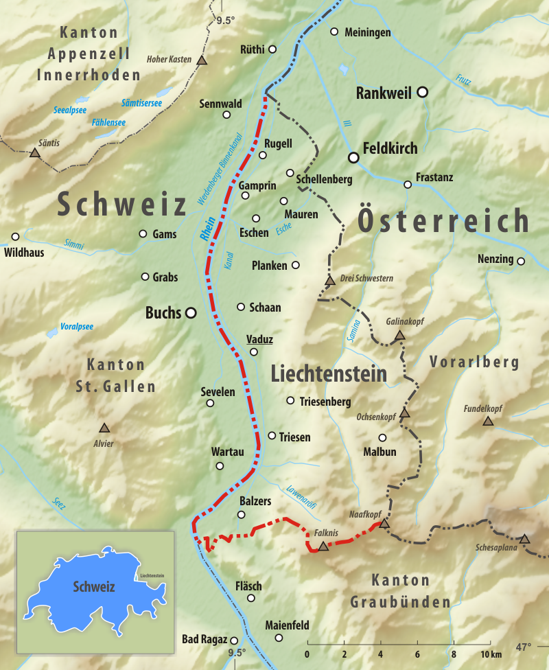 Reliefkarte des Grenzverlaufes zwischen der Schweiz und Liechtenstein Topographischer Hintergrund: NASA Shuttle Radar Topography Mission (public domain). SRTM3 v.2.